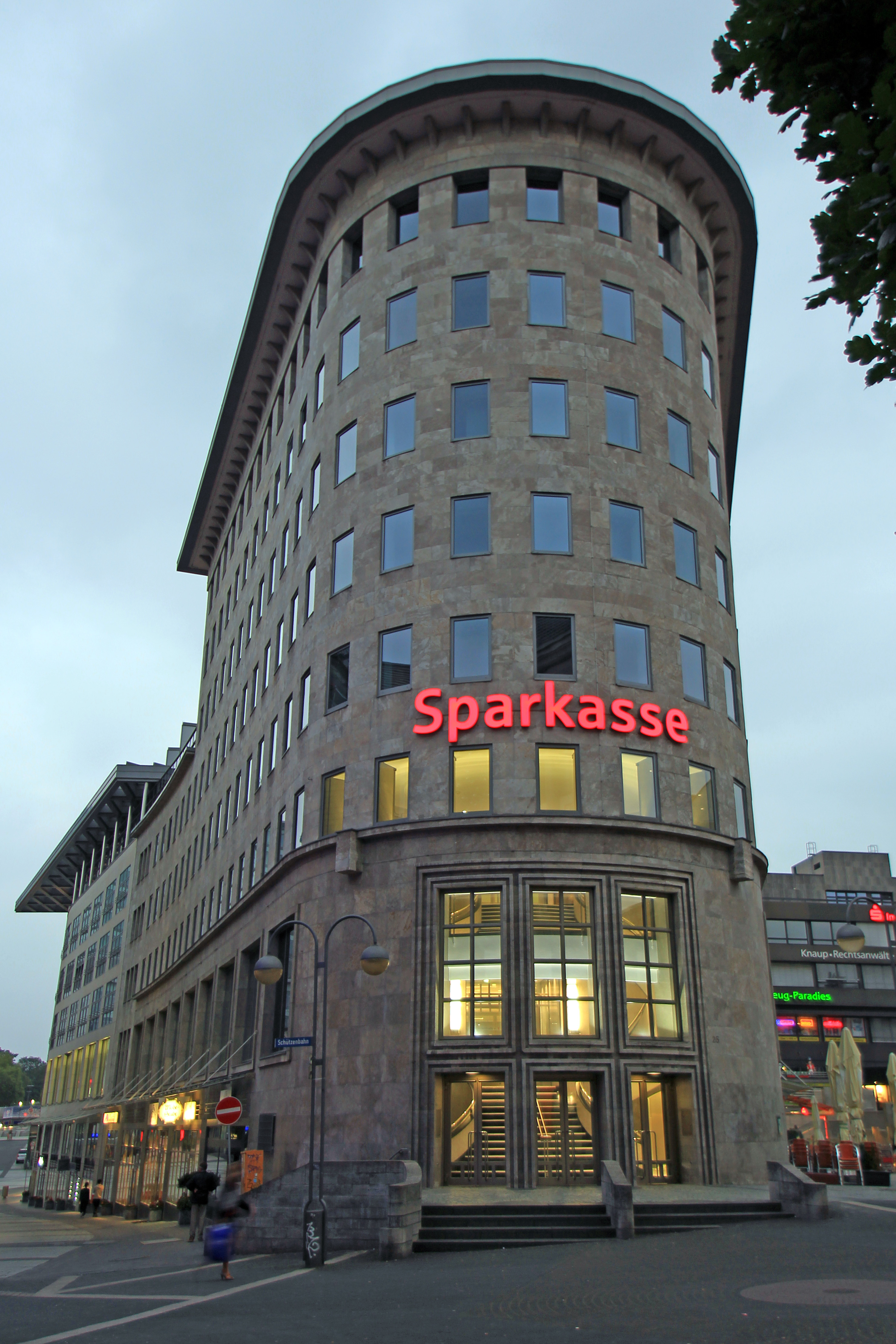 Sparkasse, Dr.-Ruer-Platz 5, Bochum, 2014. This image shows a heritage building in Germany, located in the North Rhine-Westphalian city Bochum (no. A 506).